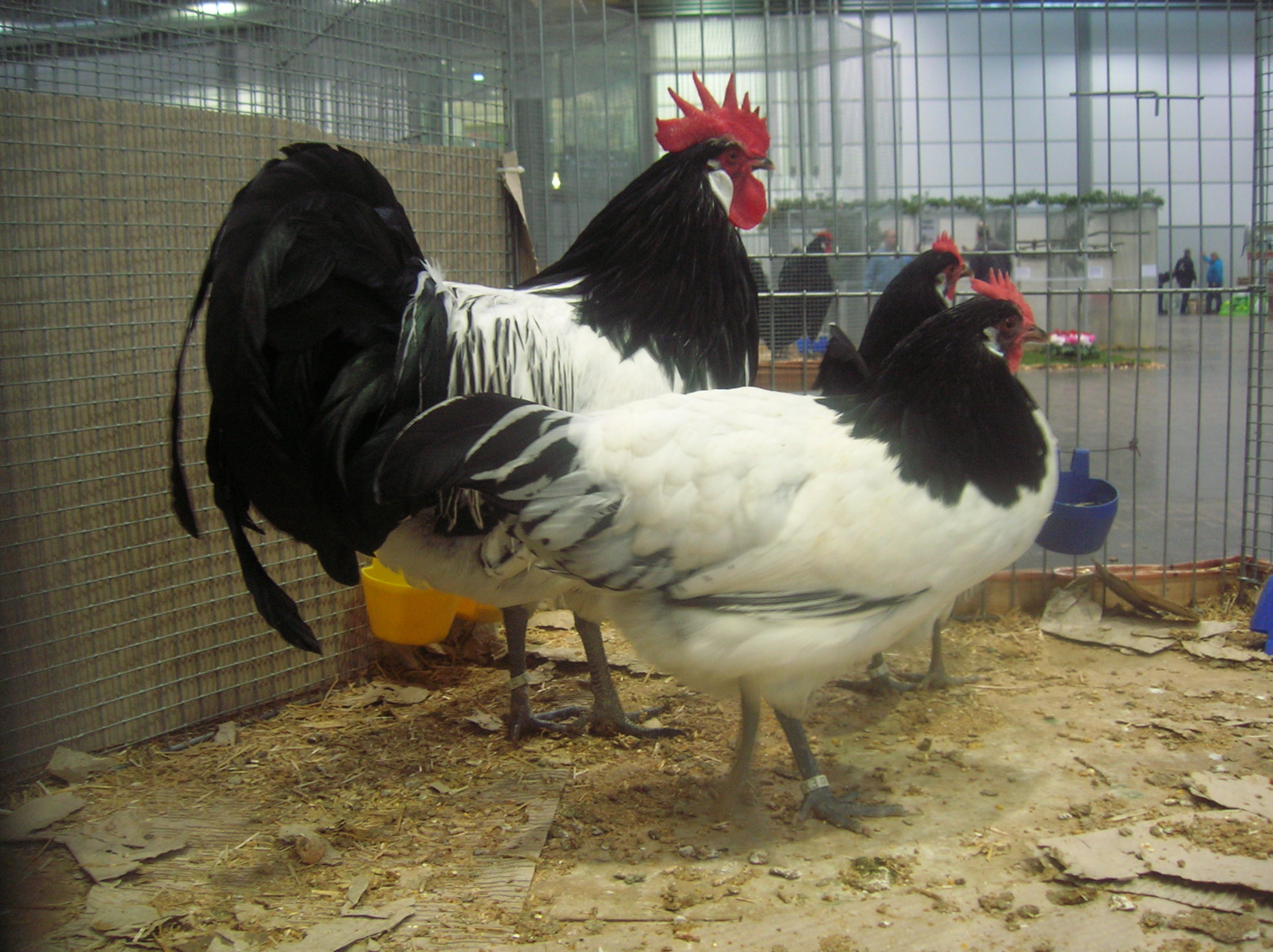 Polli Lakenvelder esposti alla Mostra Avicola di Lipsia del 2015.